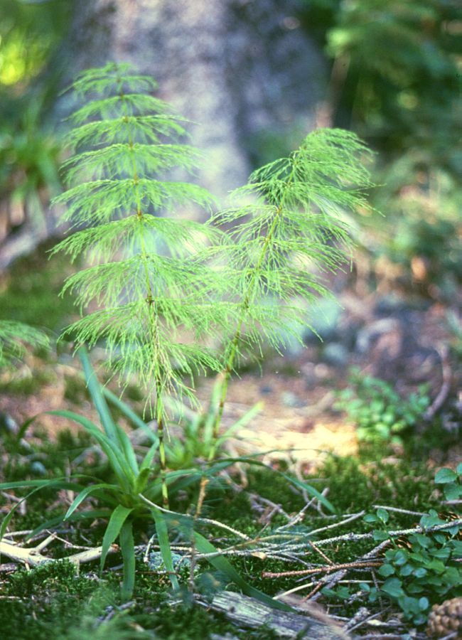 Wald-Schachtelhalm (Equisetum sylvaticum L.), Schachtelhalmgewächse (Equisetaceae) - Österreich/Austria/Autriche: Oberösterreich, Südfuß des Hohen Krahbergs NW Taferlklause, ca. 15 km SW Gmunden